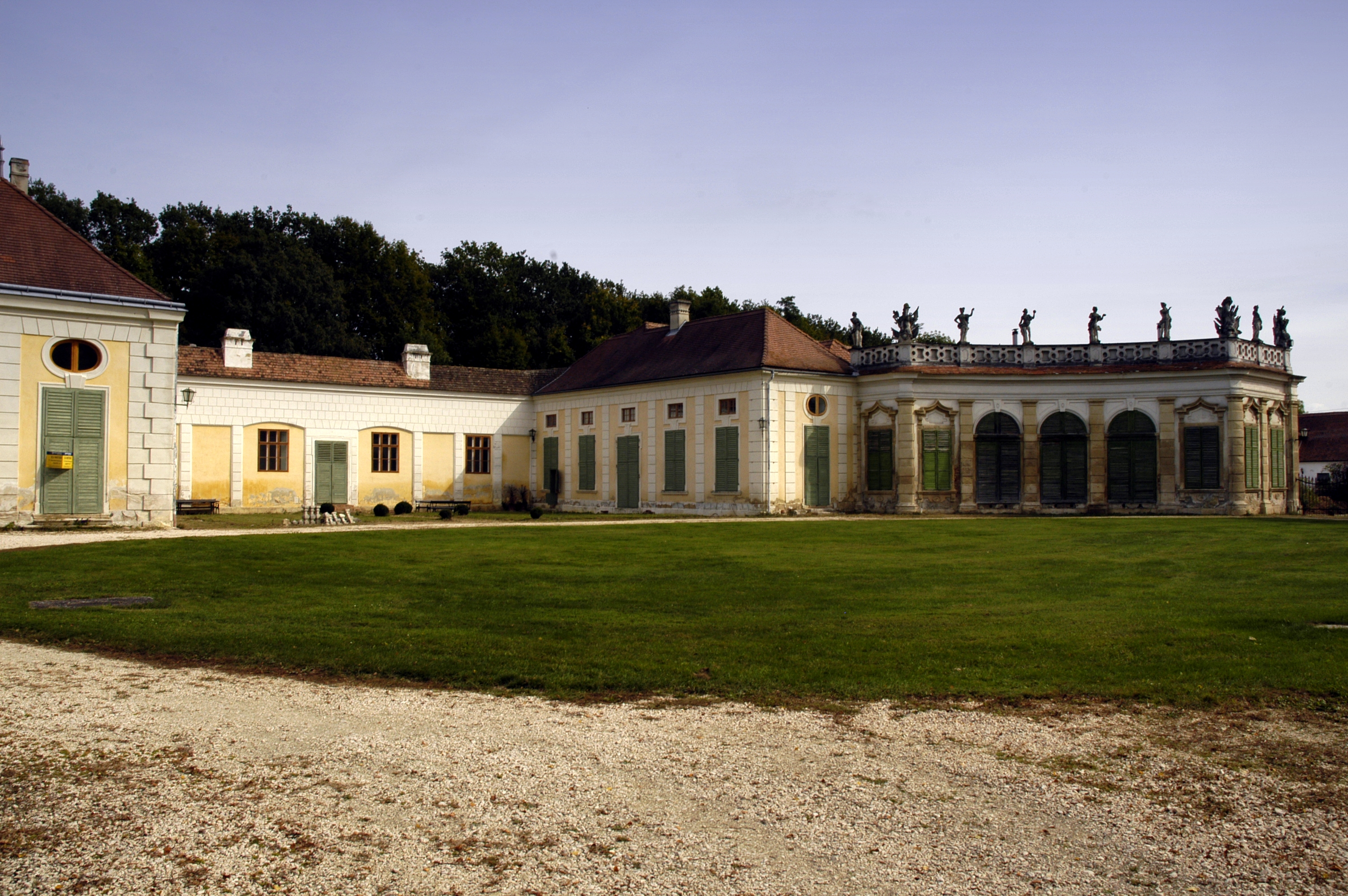 Schloss Schönborn - Nebengebäude